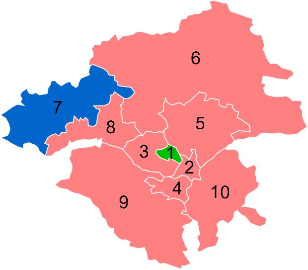 Résultats des élections législatives de la Loire-Atlantique en 2012